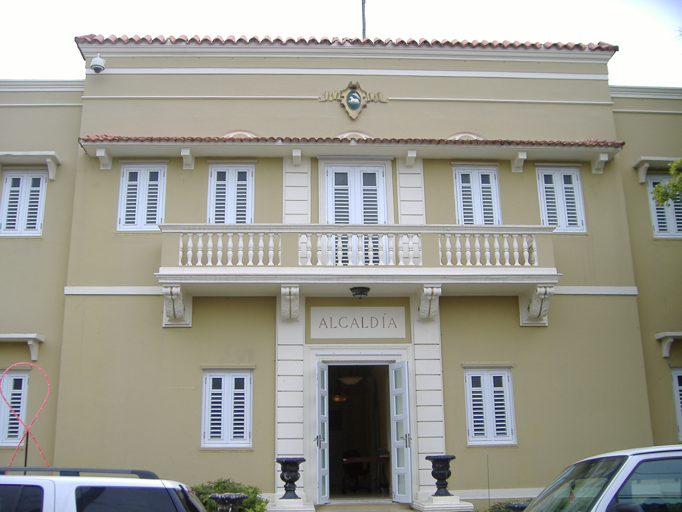 San Lorenzo, Puerto Rico's Town Hall